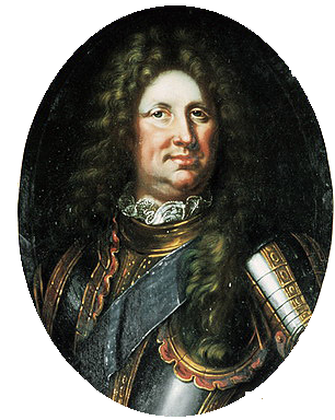 Markgraf Friedrich VII von Baden-Durlach (1647-1709)